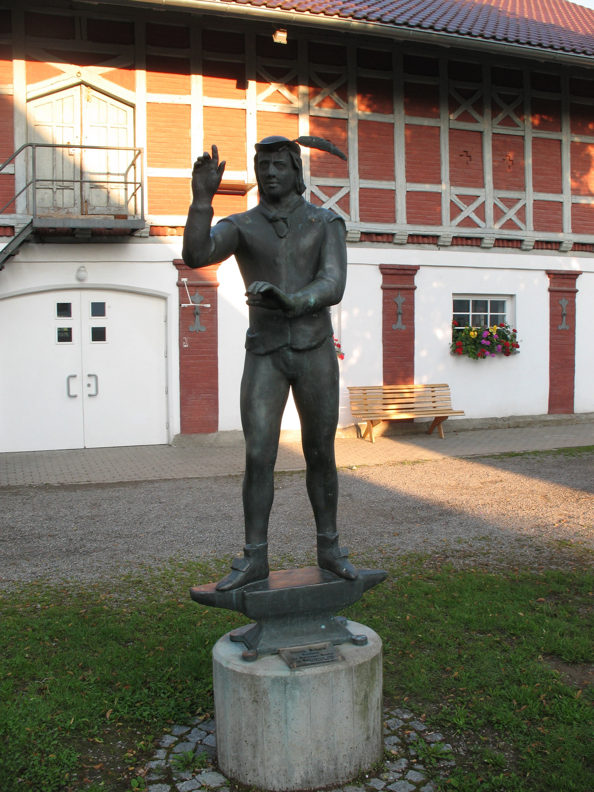 Ein Denkmal für den Bauernführer Ulrich Schmied in Sulmingen.